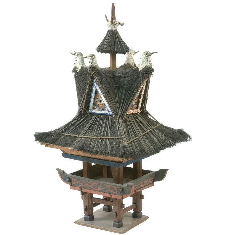 Huismodel. Houten model van een Karo-Batak schedelhuis Unknown language: Rumah sendi of Geriten